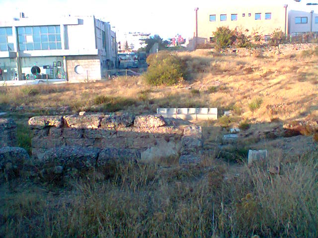 Αρχαίο θέατρο Ευωνύμου 002